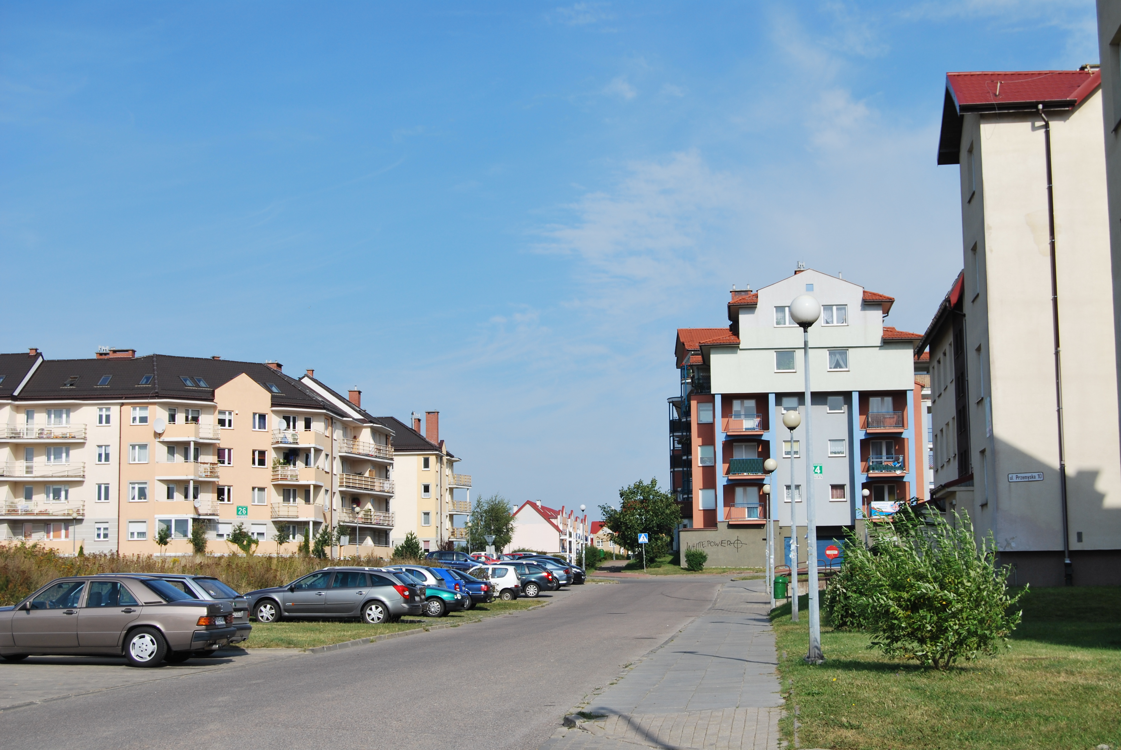 Gdańsk Ujeścisko u. Przemyska (2009)